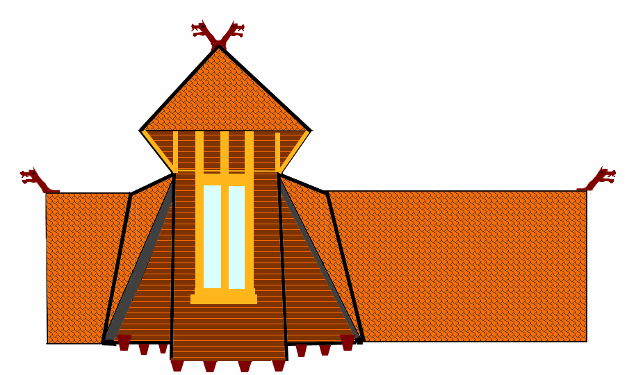 Tête de dragon comme élément ornemental du toit du bâtiment des douanes allemandes au col de la Schlucht pendant l'annexion de l'Alsace-Lorraine.